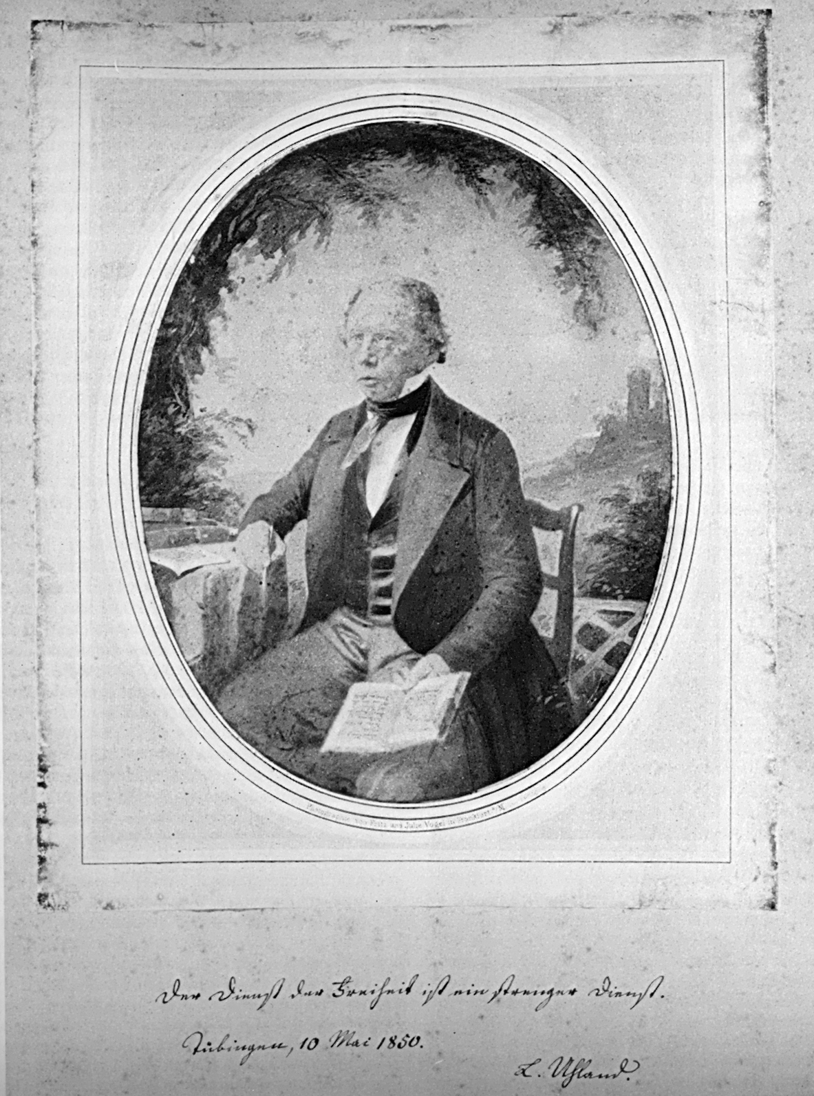 Ludwig Uhland ([im Original] kolorierte Talbotypie)